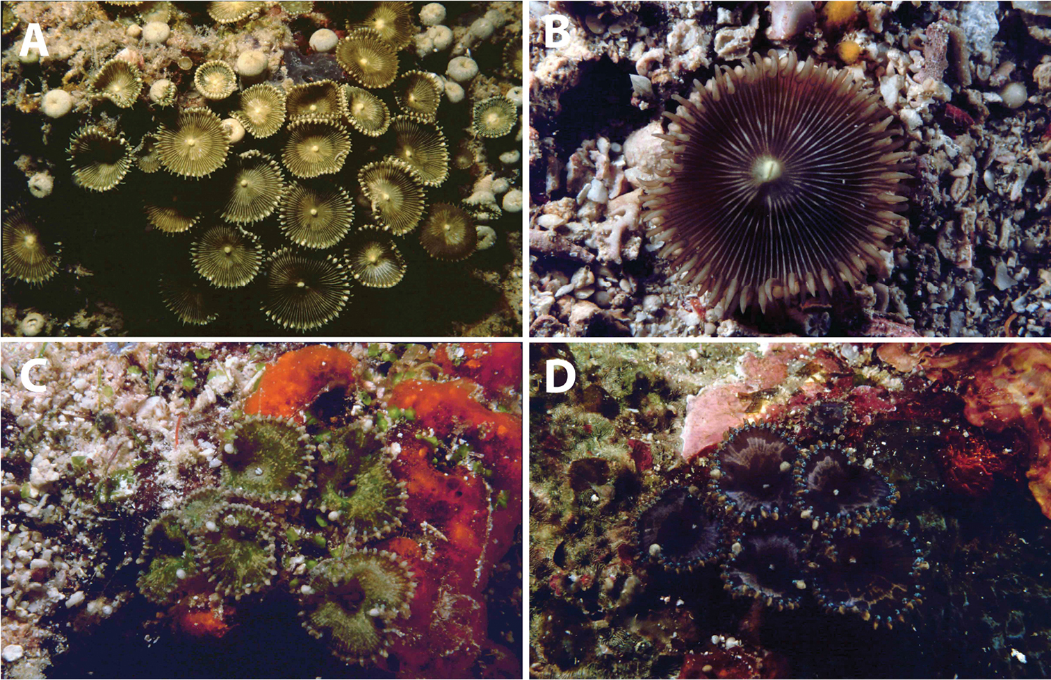 A Palythoa cf. heliodiscus en el lado noroeste de Pulau Samalona, Spermonde Archipelago, Sulawesi, 1997 B P. cf. heliodiscus en el lado sur de Pulau Derawan, East Kalimantan, 2003 C P. cf. heliodiscus en Karang Koromaha, Sulawesi sudeste, Wakatobi, Tukang Besi Is.,2003; y D P. cf. heliodiscus en Wakatobi National Park .Pulau Binongko, Sulawesi, Wakatobi, islas Tukang Besi, 2003.